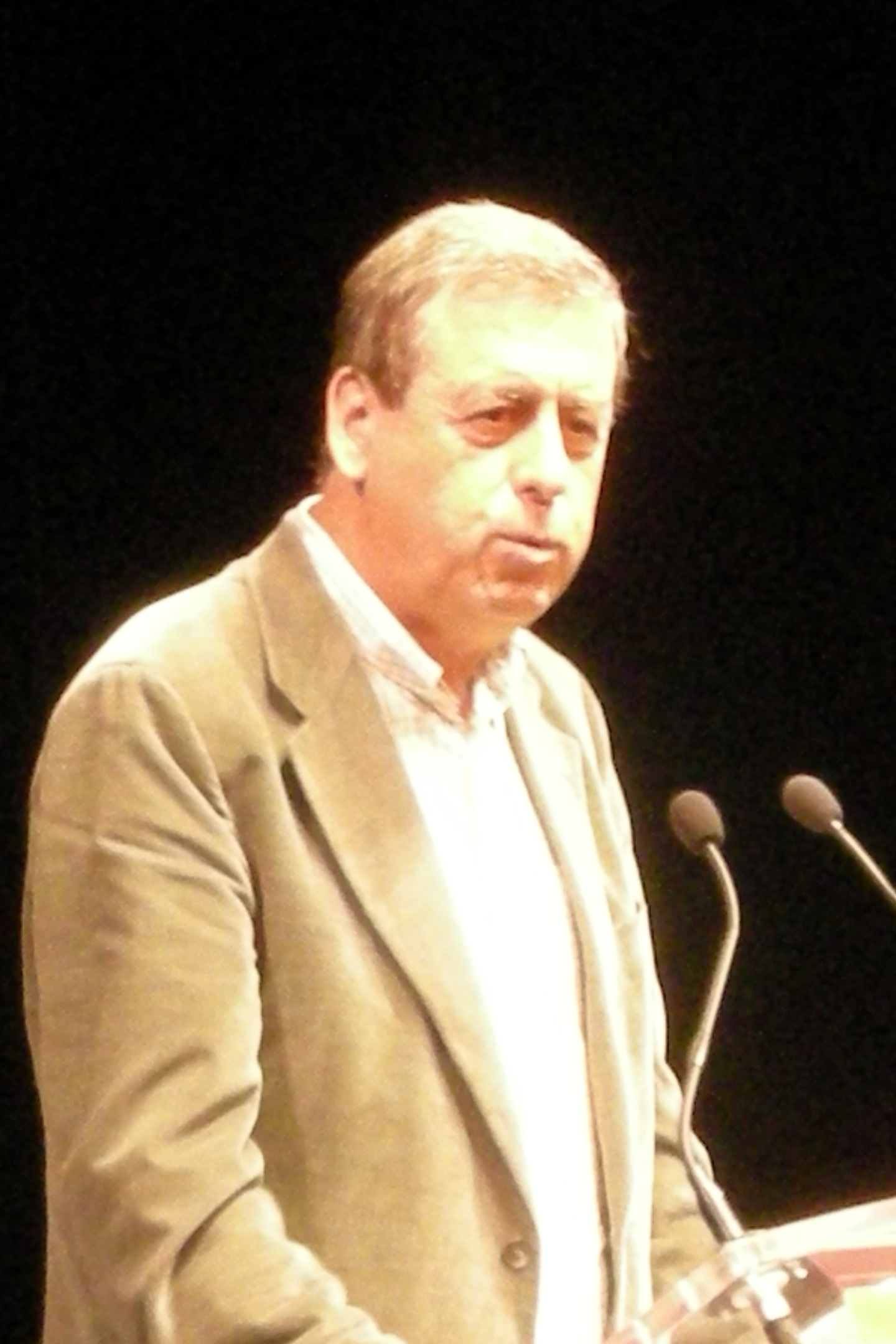 Fernando Sosa Wagner. Acto de I Aniversario de UPyD. Madrid.